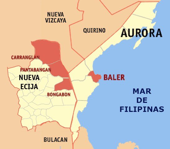 Poblaciones cercanas a Baler